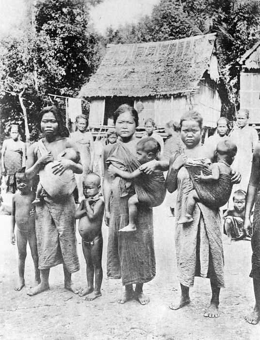 Repronegatief. Een groep Kubu vrouwen met hun kinderen, Ikan Labar, Sumatra